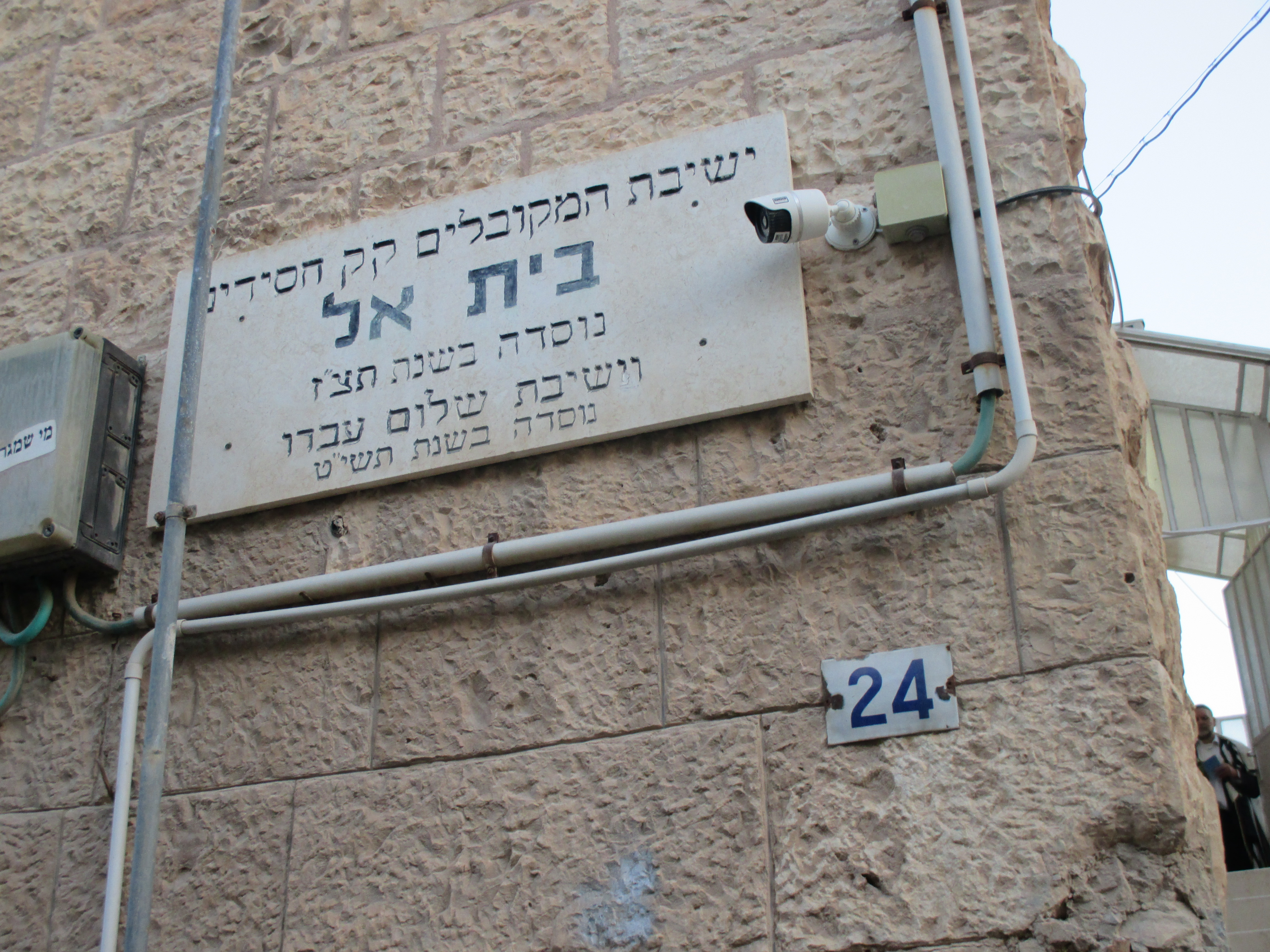 ישיבת בית אל ברחוב רש"י בירושלים.